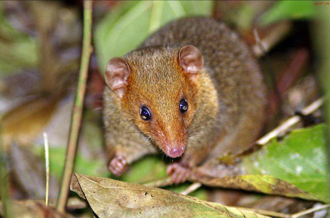 Monodelphis scalops, marsupial encontrado no Brasil e outros países da América do Sul